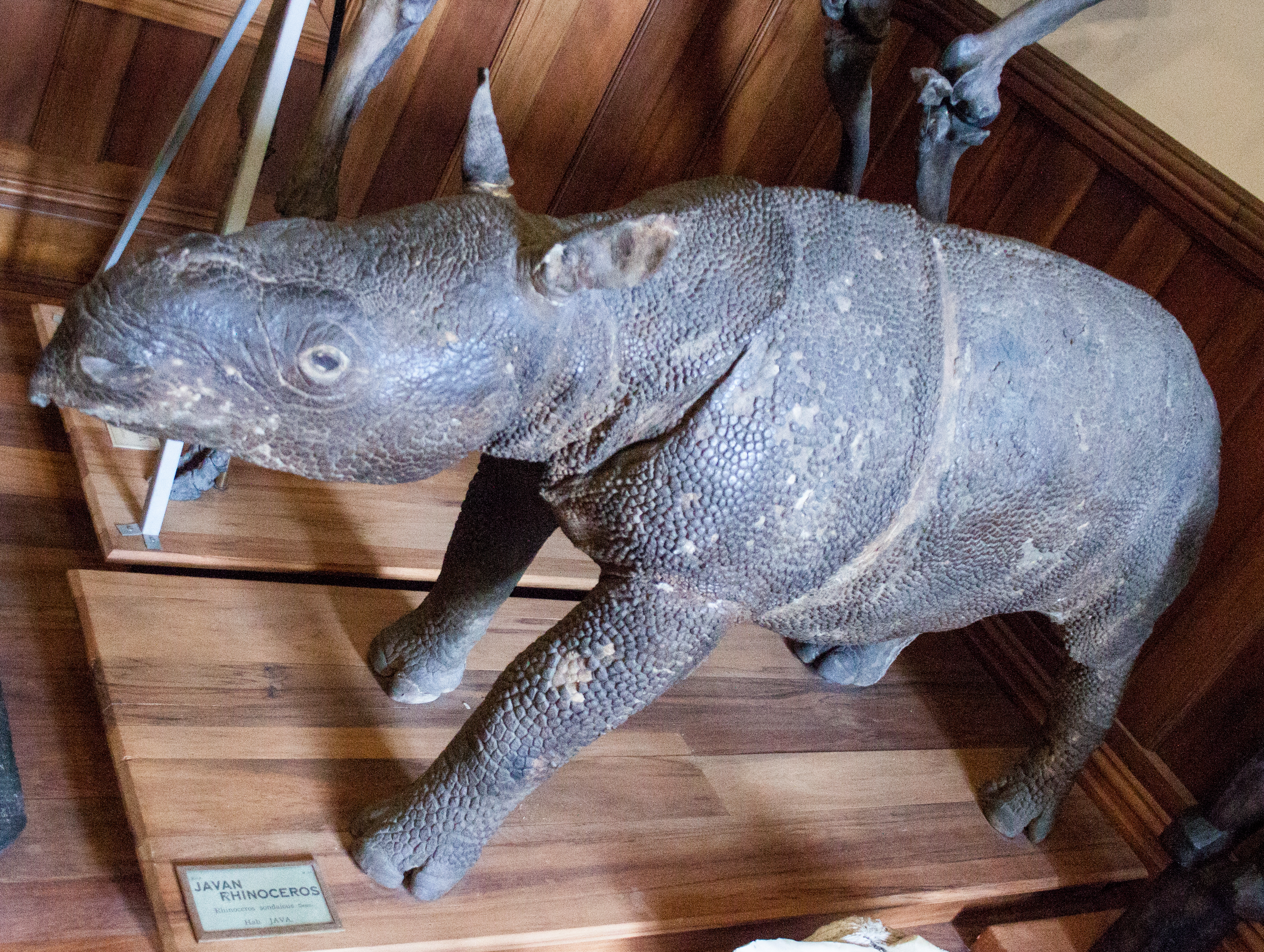 Javan Rhinoceros